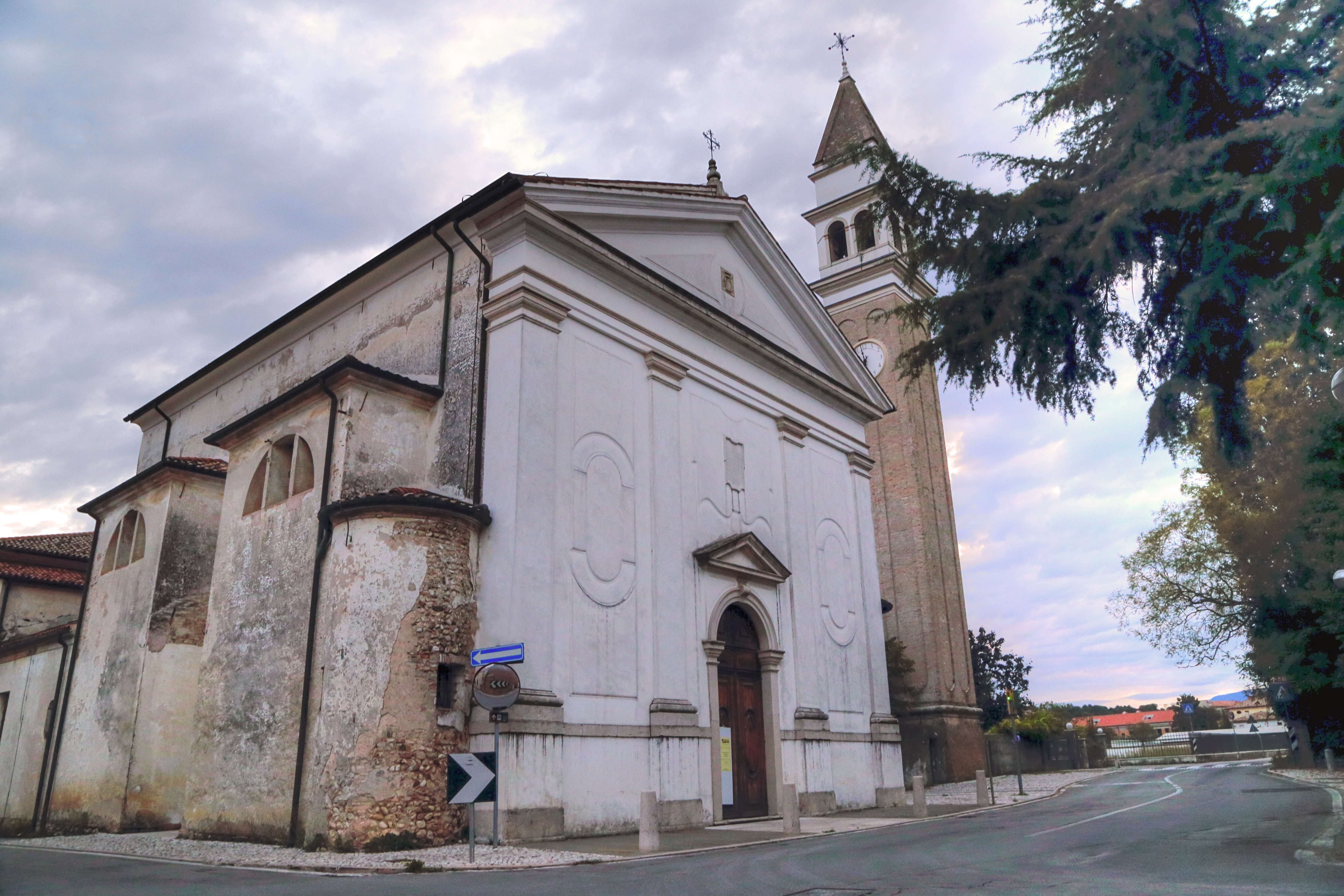 Veduta della Chiesa dei Santi Lucia e Vittore